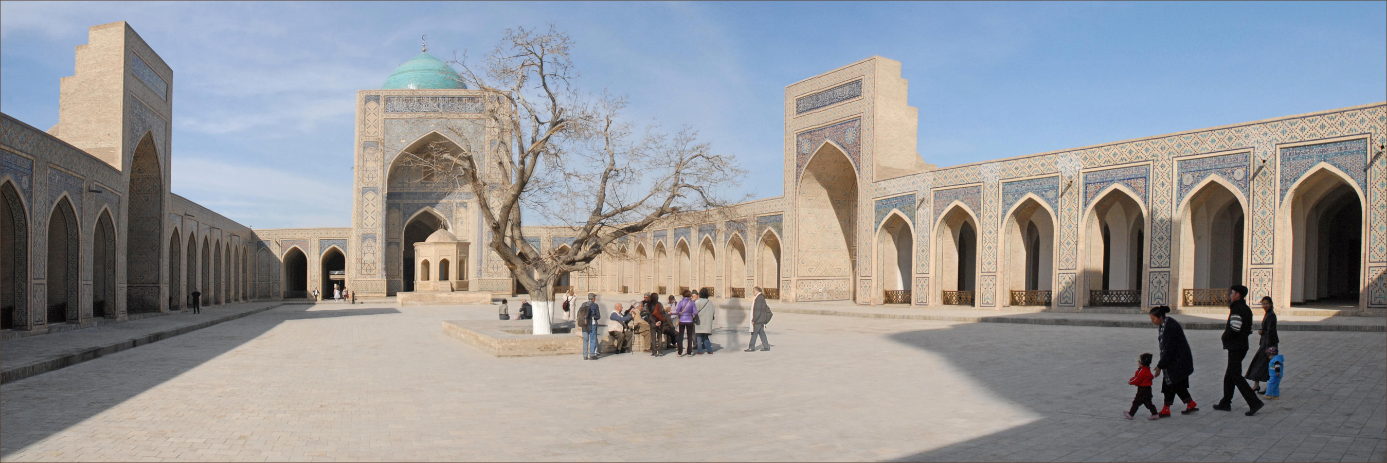 La cour de la mosquée Kalon La cour comporte 4 iwans (3 sur la photo panoramique), elle est entourée d'une galerie de 208 colonnes supportant 288 coupoles. Au fond, le pavillon octogonal face au mihrab surmonté du dôme bleu-vert. C'est l'une des mosquées les plus anciennes mais aussi les plus vastes de l'Asie centrale. La première construction sur ce site date de 795 par les conquérants arabes de la Sogdiane. Le bâtiment actuel a été achevé en 1514, par la suite il a été embelli puis restauré de nombreuses fois depuis l'époque soviétique.